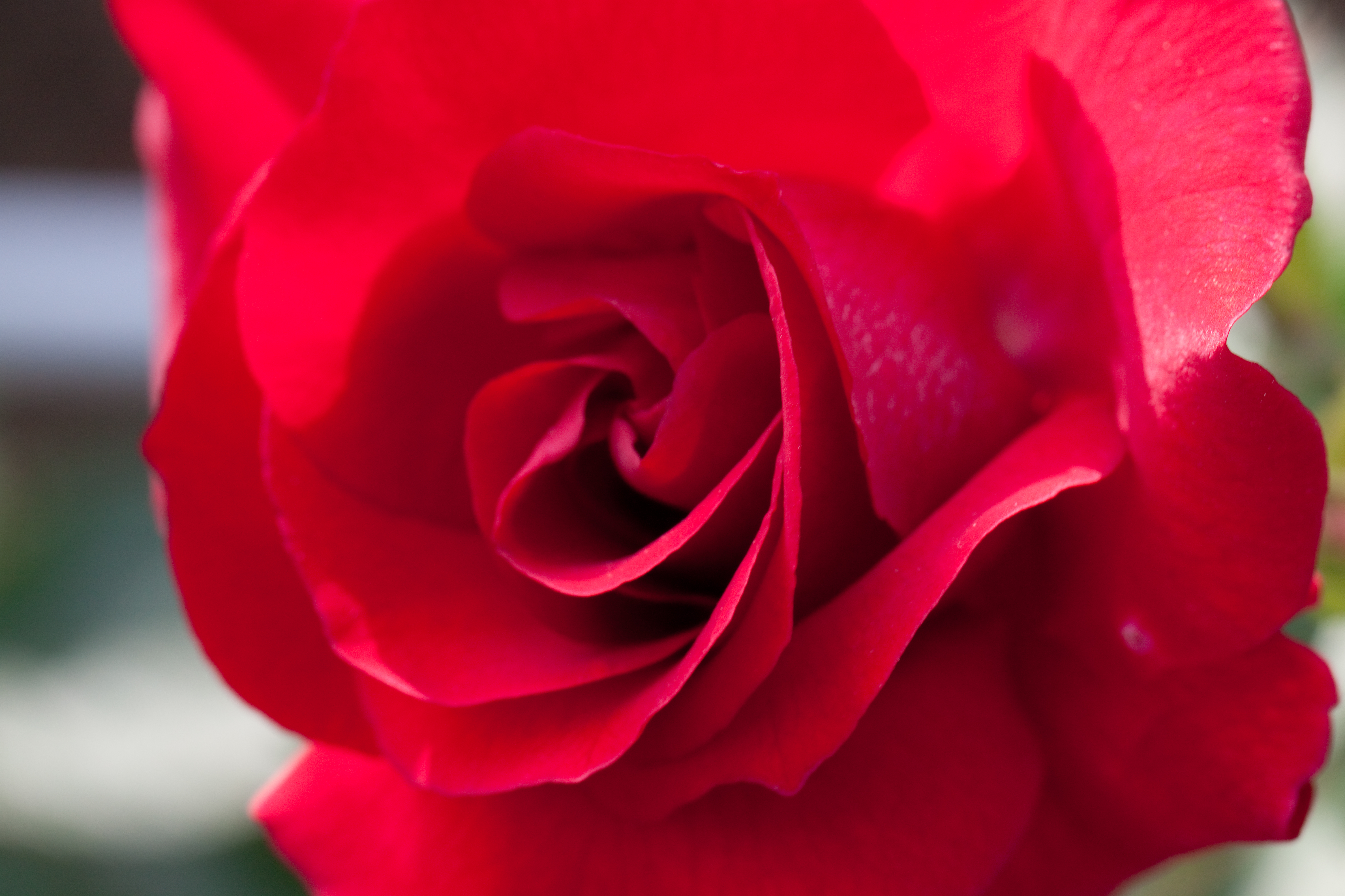 Ulmer Muenster. ウルメール・ムンスター。